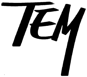 Логотип латвийской телекомпании "TEM TV"